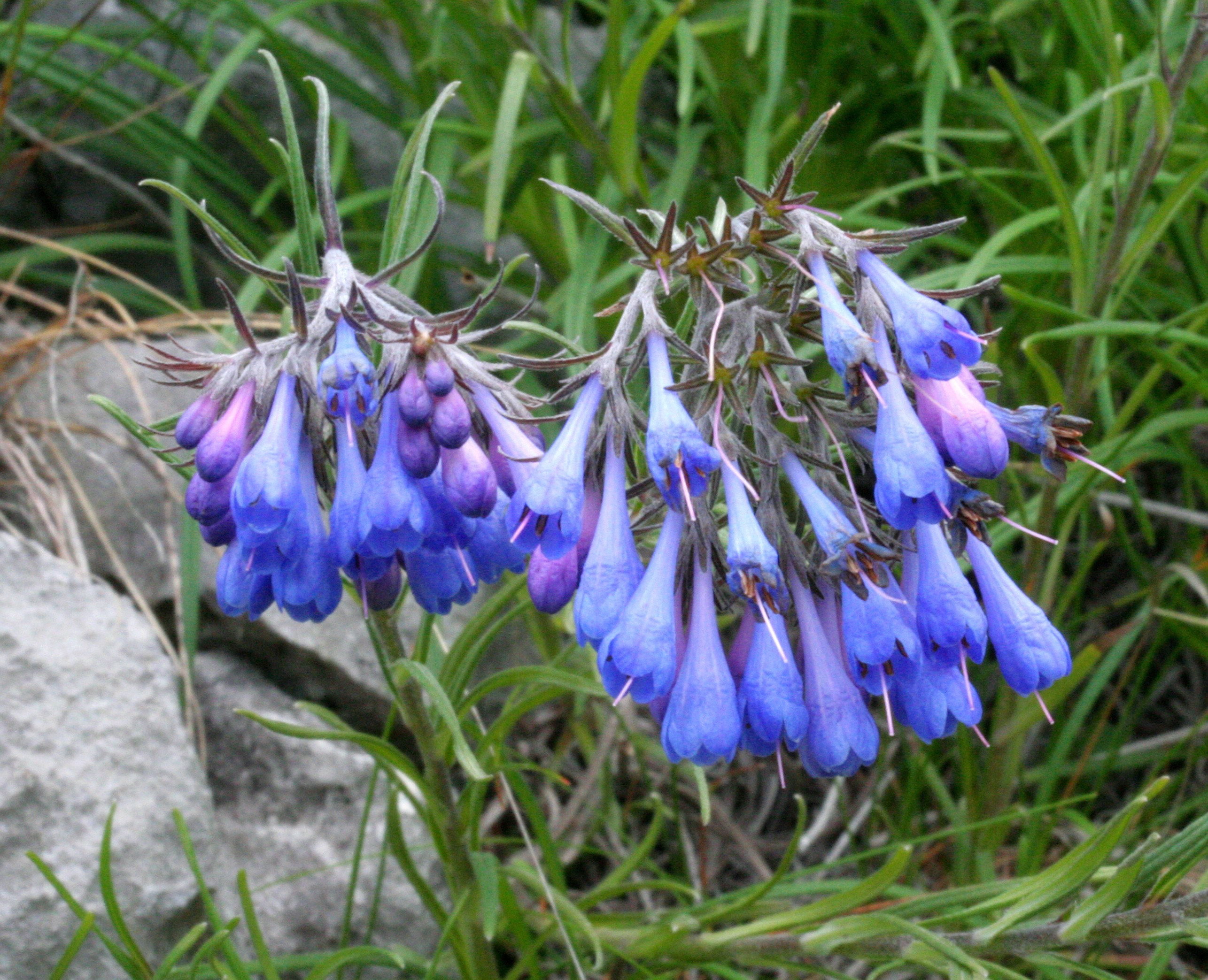 Erba perla rupestre - Località : "Giardino Botanico delle Alpi Orientali", Monte Faverghera (BL), 1500 m s.l.m.